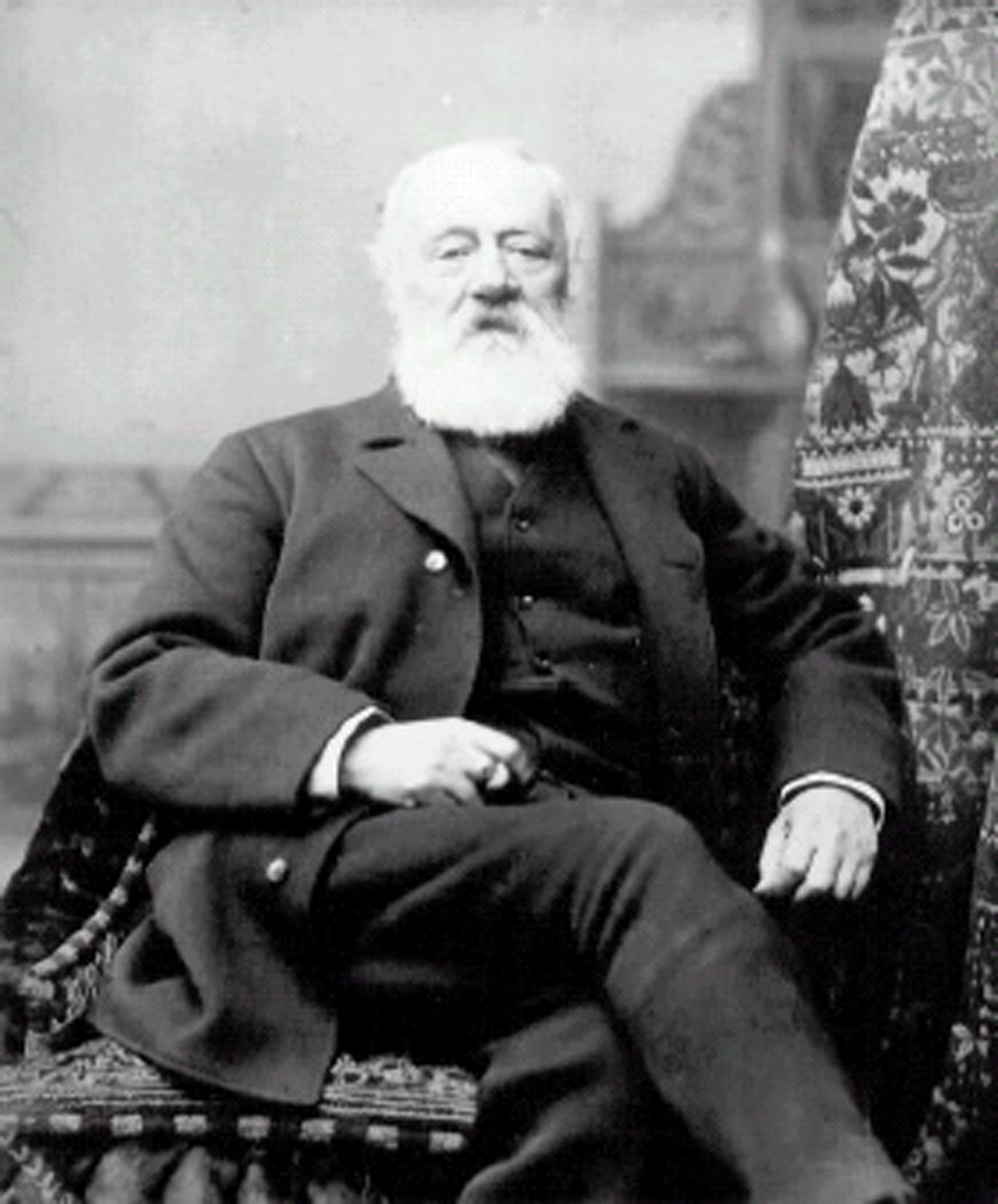 Antonio Meucci (1808 - 1889), inventore del telefono.